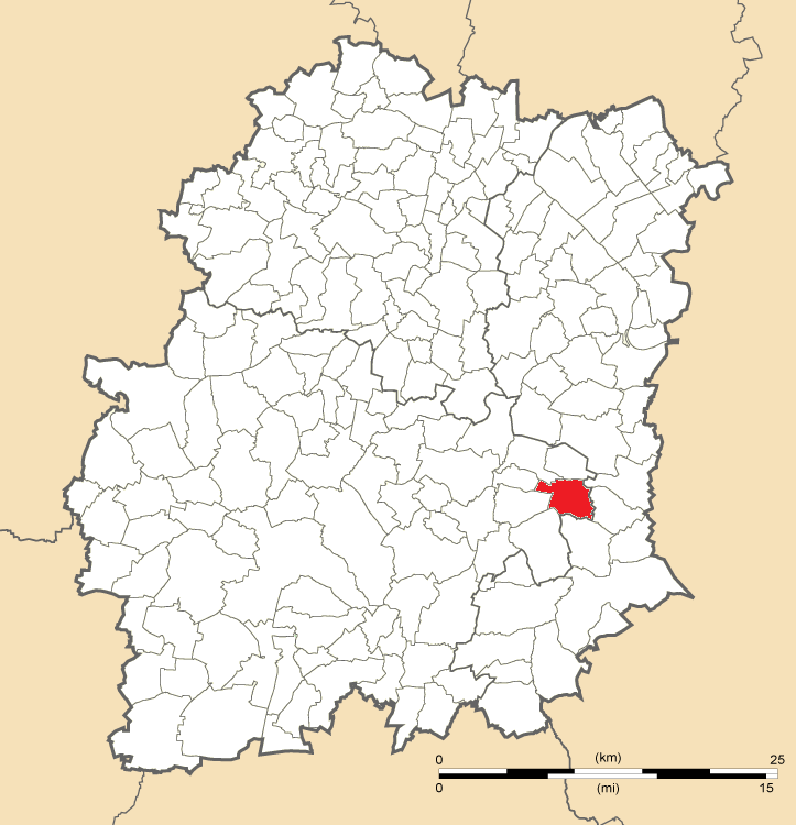 Carte de position de Videlles en Essonne (91)